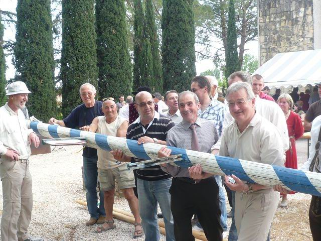 Maibaumniederlegung